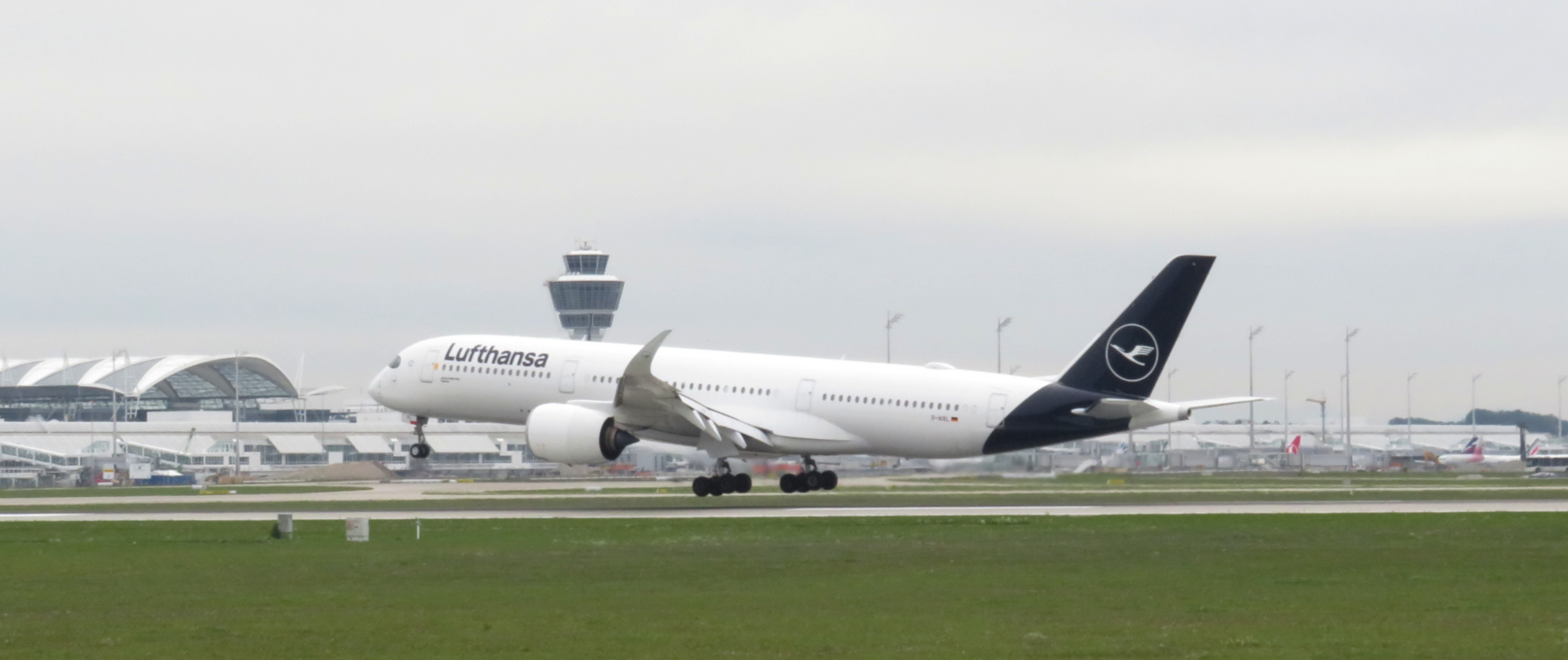 Lufthansa A350-900 D-AIXL 2019-09-22 Munich Airport